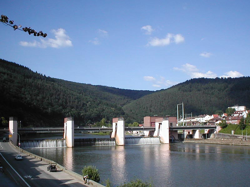 Neckarstauwehr Hirschhorn